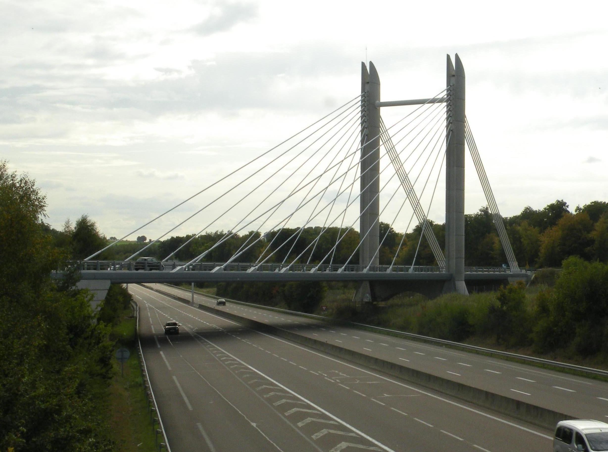 Un pont à haubans à Beauvais, département de l'Oise, France, sur l'autoroute A16.